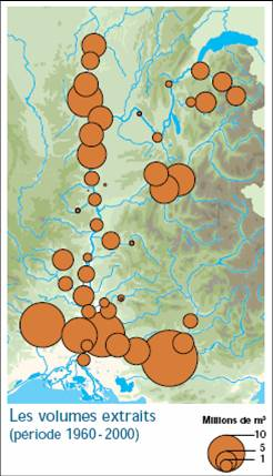 carte synthétique des extractions de matériaux alluvionnaires dans la vallée du Rhône.